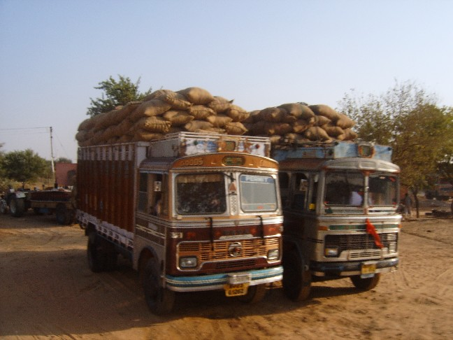 Tata Motors trucks in Rajahstan, Indie.